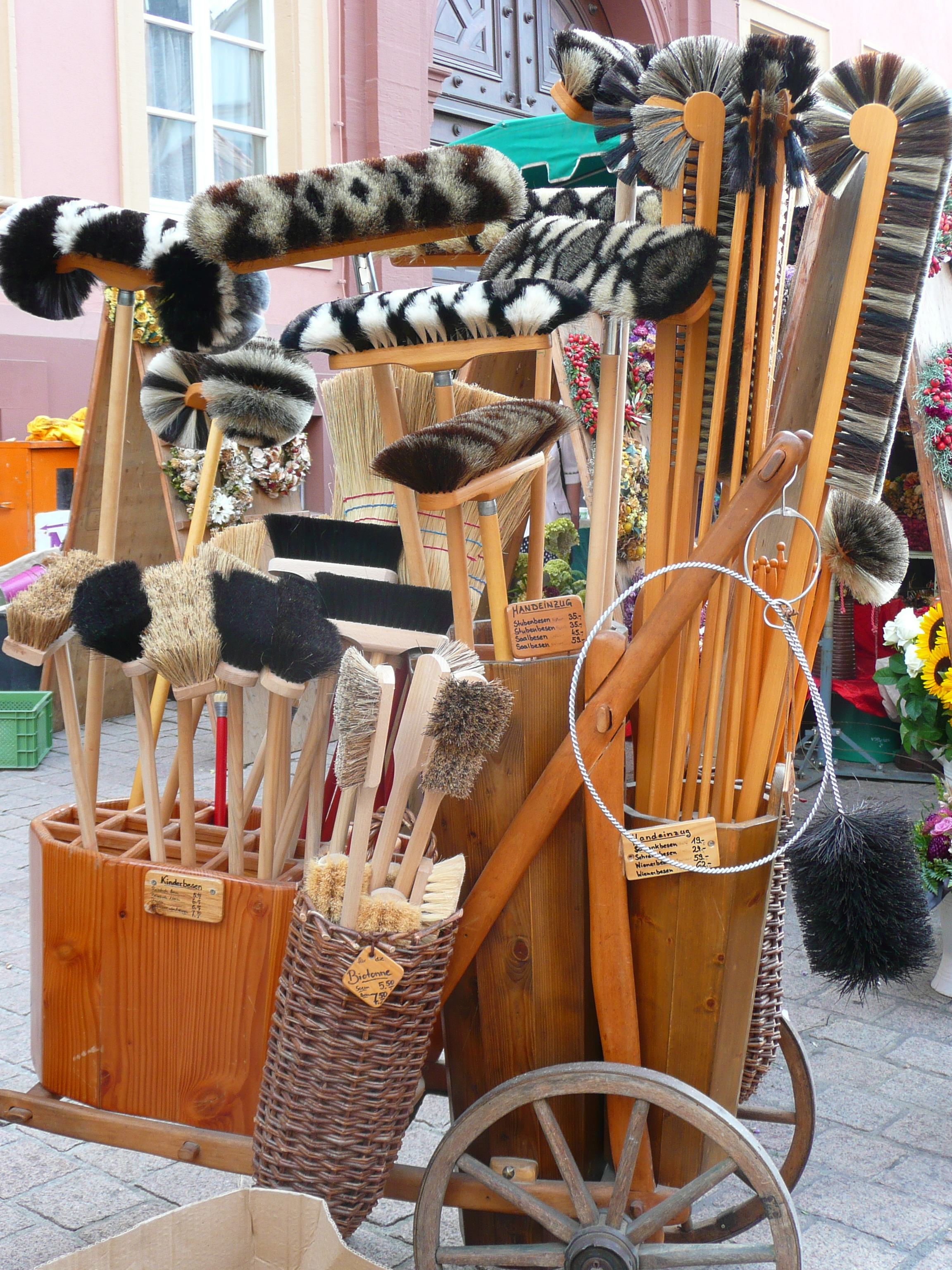 Verschiedene handgefertigte Bürsten und Besen